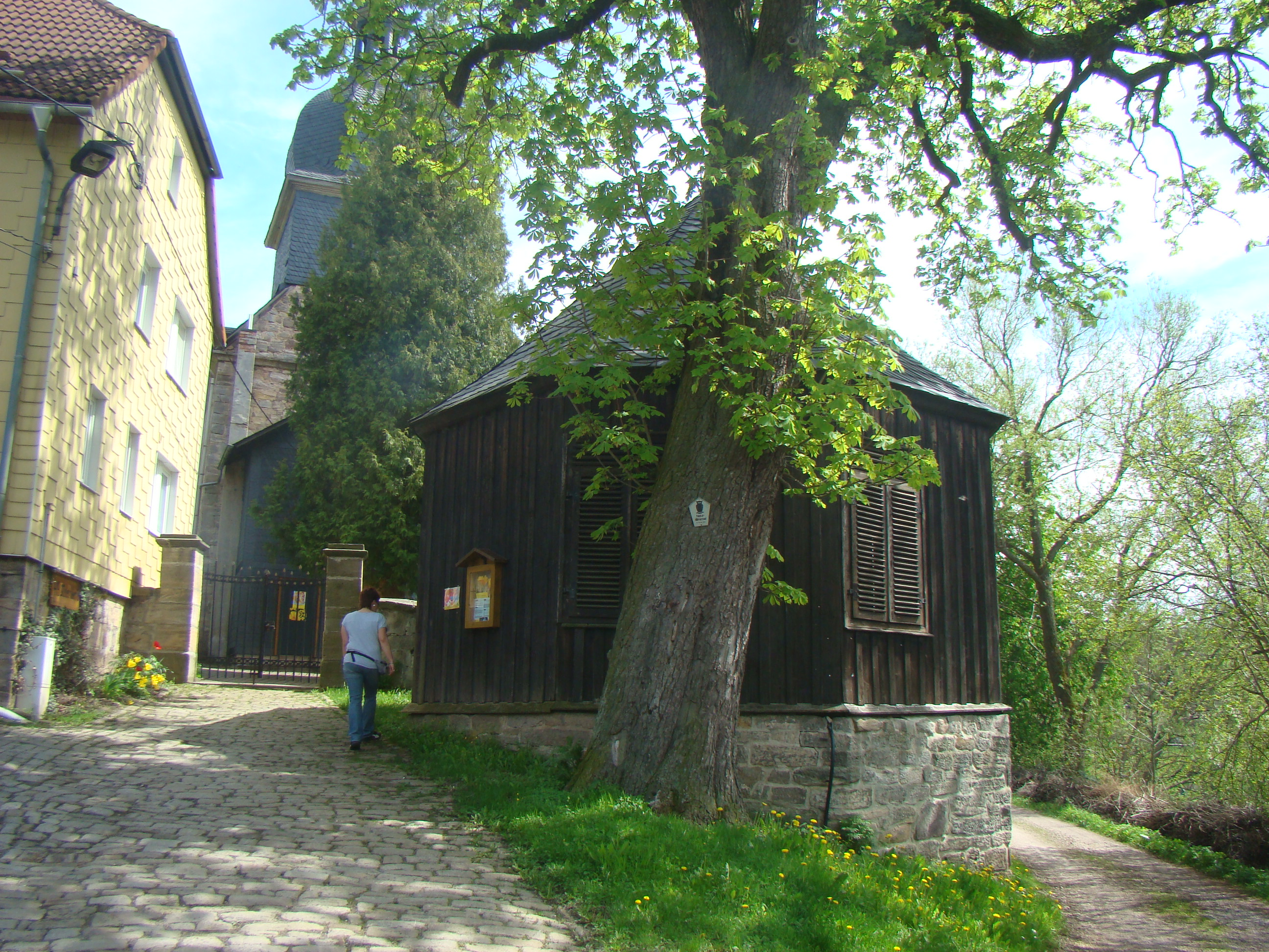 Freistehender überdachter Glockenstuhl bei der Kirche in Martinroda (Ilm-Kreis)